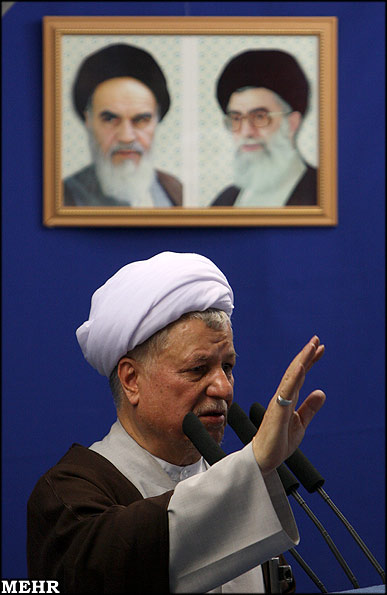 نماز جمعه ۲۶ تیر ۱۳۸۸ به امامت هاشمی رفسنجانی